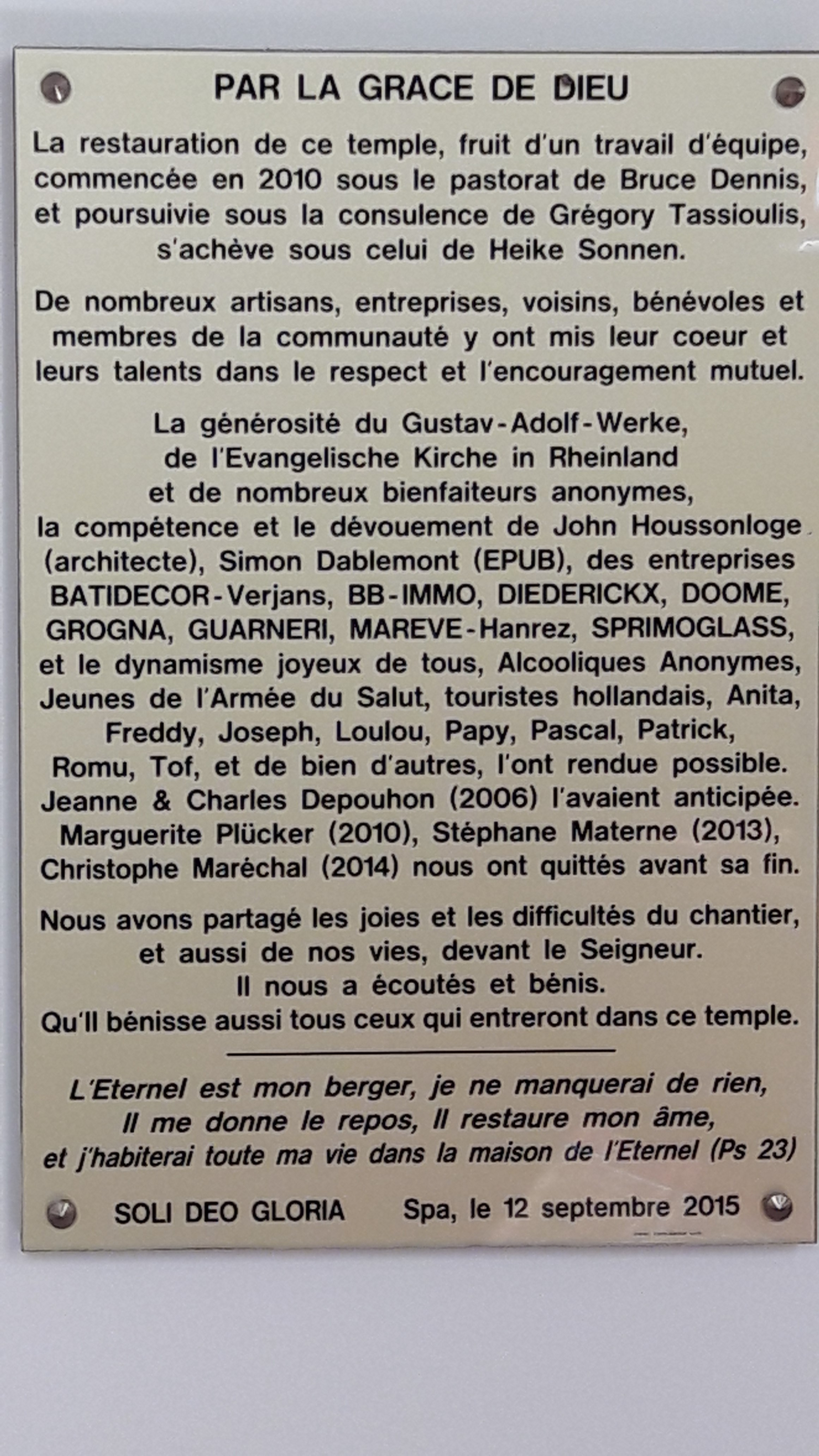 Plaque commémorative remerciant le GAW, artisans et bénévoles des travaux de restauration de l'église protestante de Spa